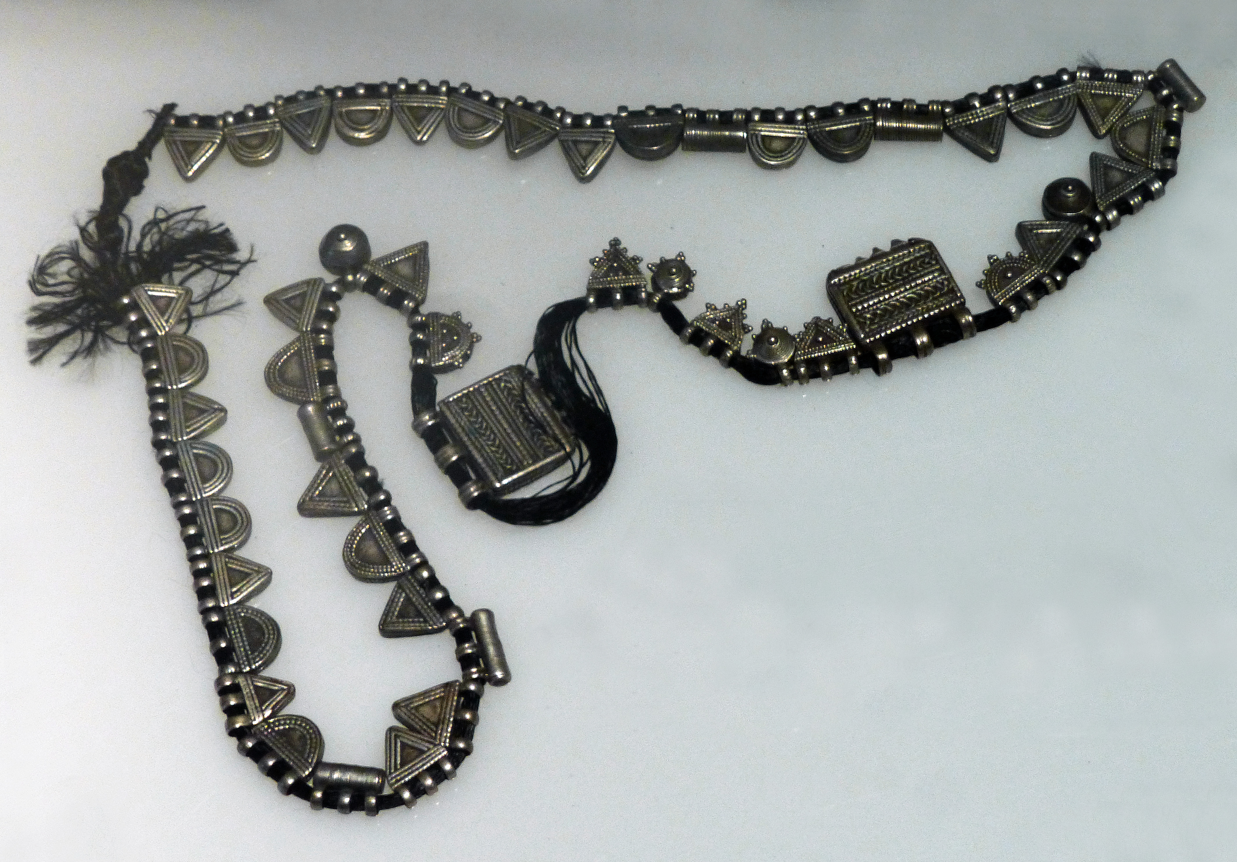 Collier tigréen en argent. Ethiopie. Musée d'histoire naturelle et d'ethnographie de Colmar. Don : Jean Doresse, 1999. N° d'inventaire : 999-254